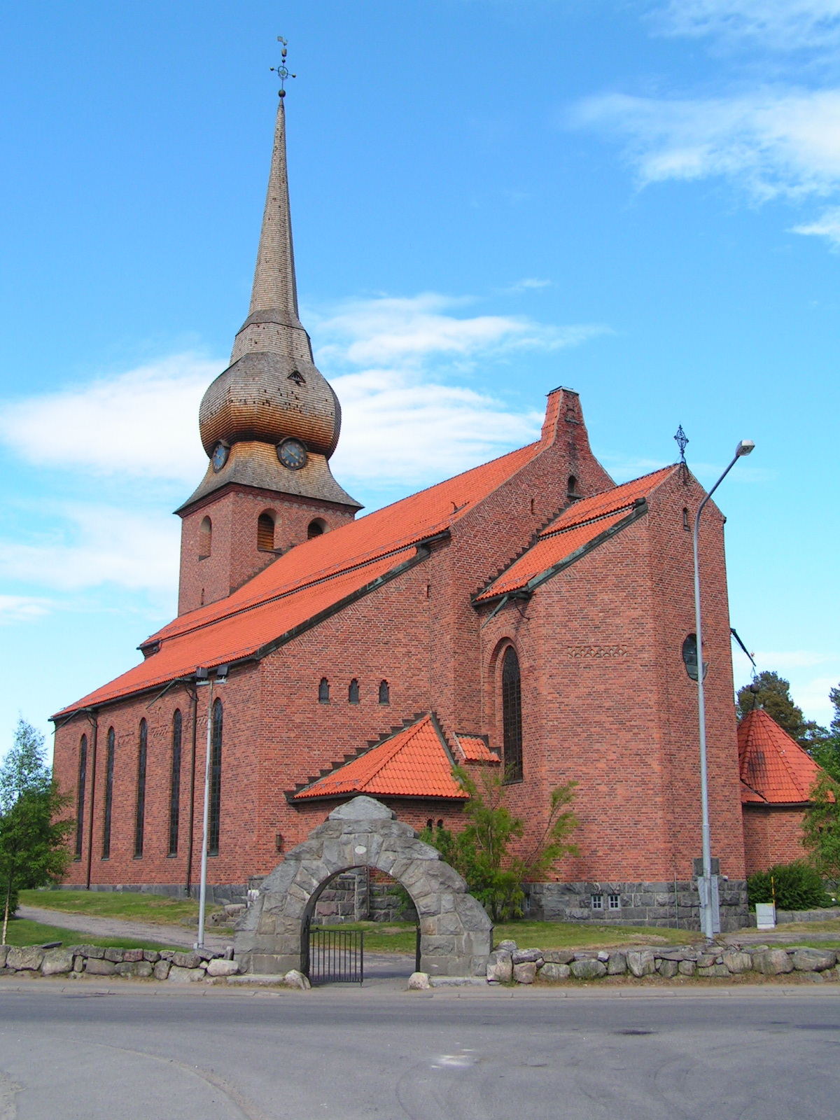 Bureå Church, Sweden (Bureå kyrka)